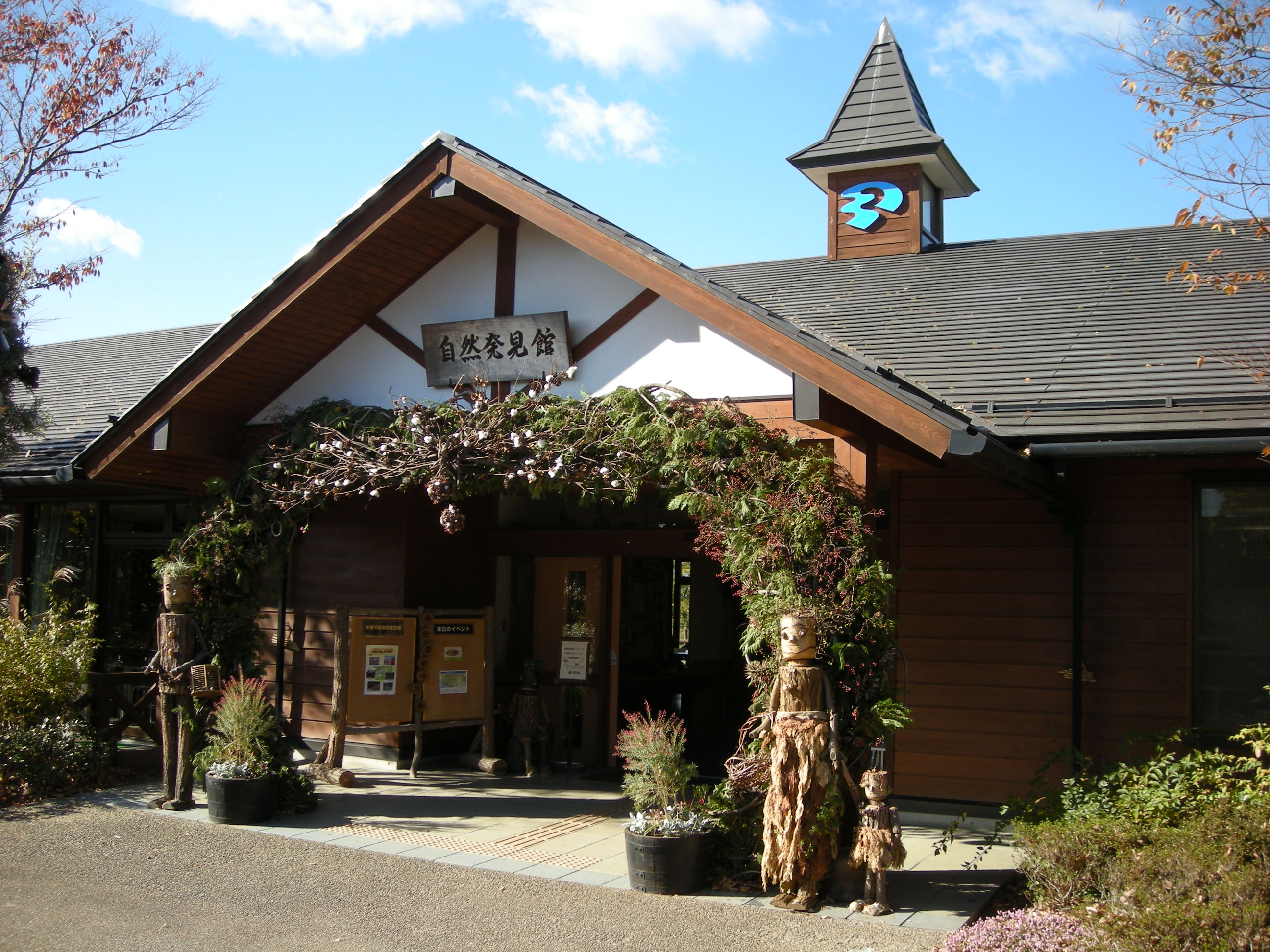 Kisagawa-Suien shizen-Hakkenkan（自然発見館）